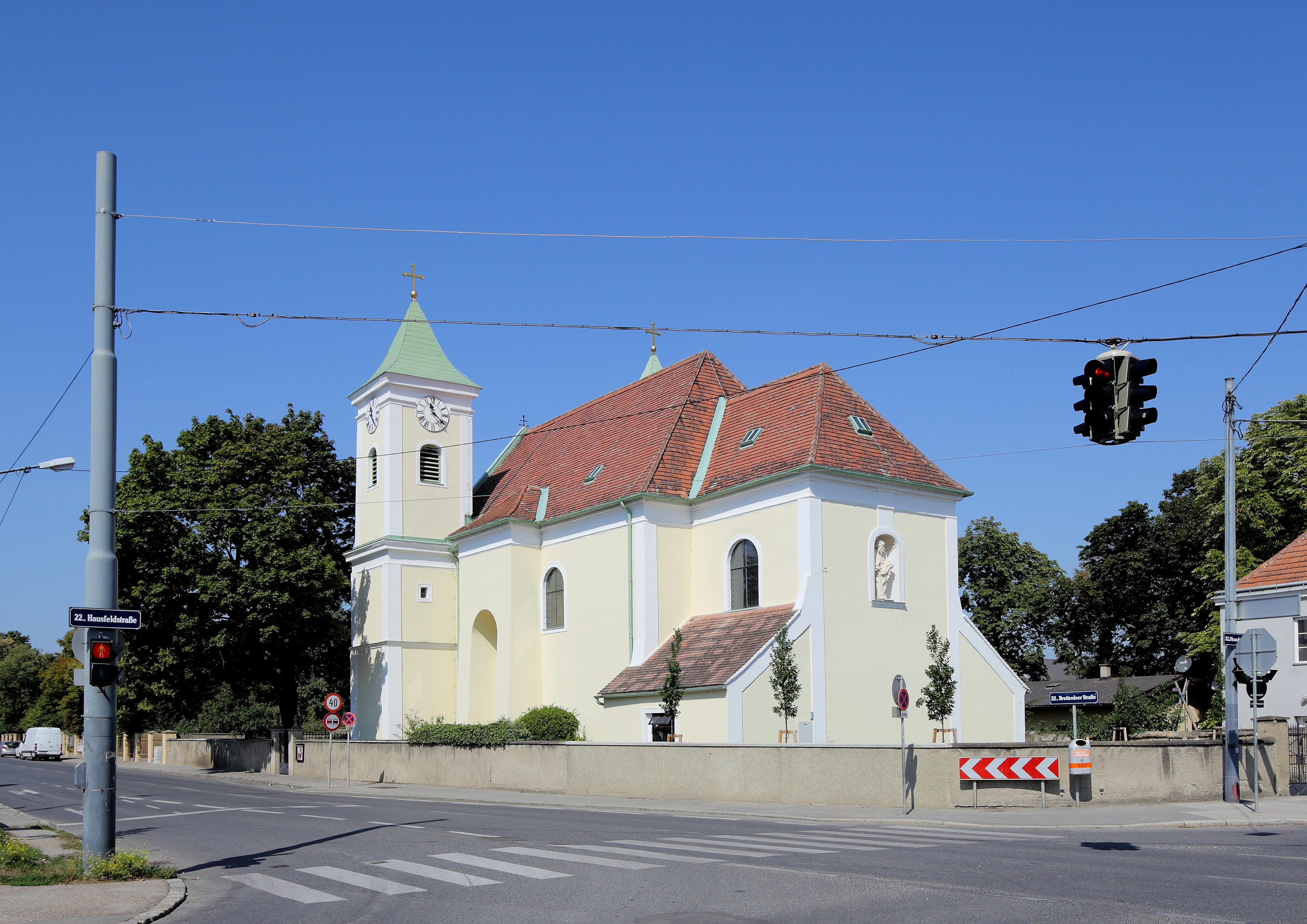 Südostansicht der röm.-kath. Pfarrkirche Hl. Anna in Breitenlee, ein Ortsteil des 22. Wiener Gemeindebezirkes Donaustadt.Die dem Schottenstift inkorporierte barocke Kirche wurde von 1697 bis 1699 nach der Neugründung von Breitenlee in der südöstlichen Ecke des Gutskomplexes errichtet. Deren zweitürmige Fassade mit Giebel zwischen den Türmen ist einzigartig im Marchfeld.